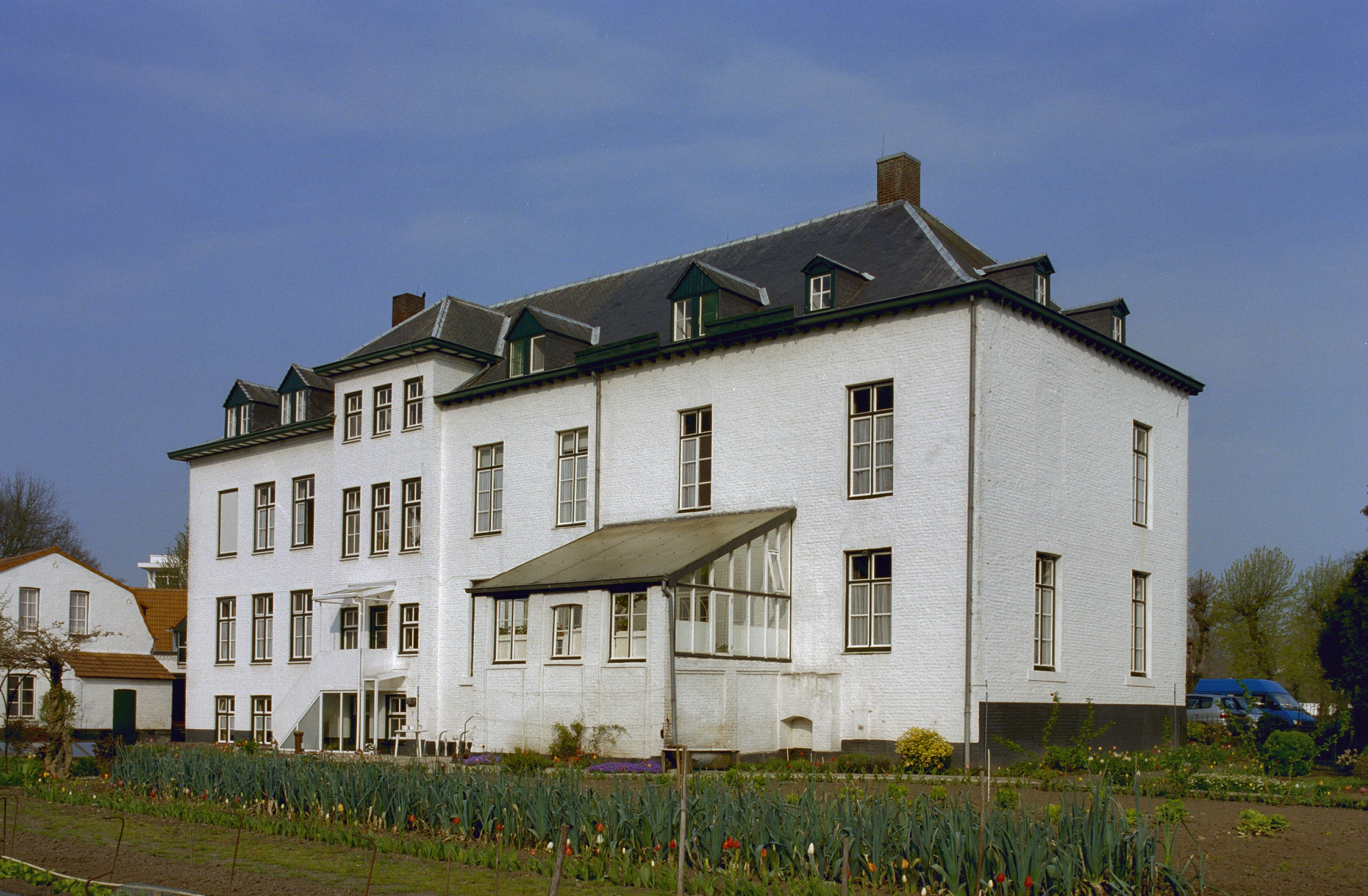 Huis Groenenberg: Overzicht van een gedeelte van de L-vormige achtergevel met uitbouw (opmerking: Gefotografeerd voor Kastelen in Limburg (1000-1800), Burchten en landhuizen)